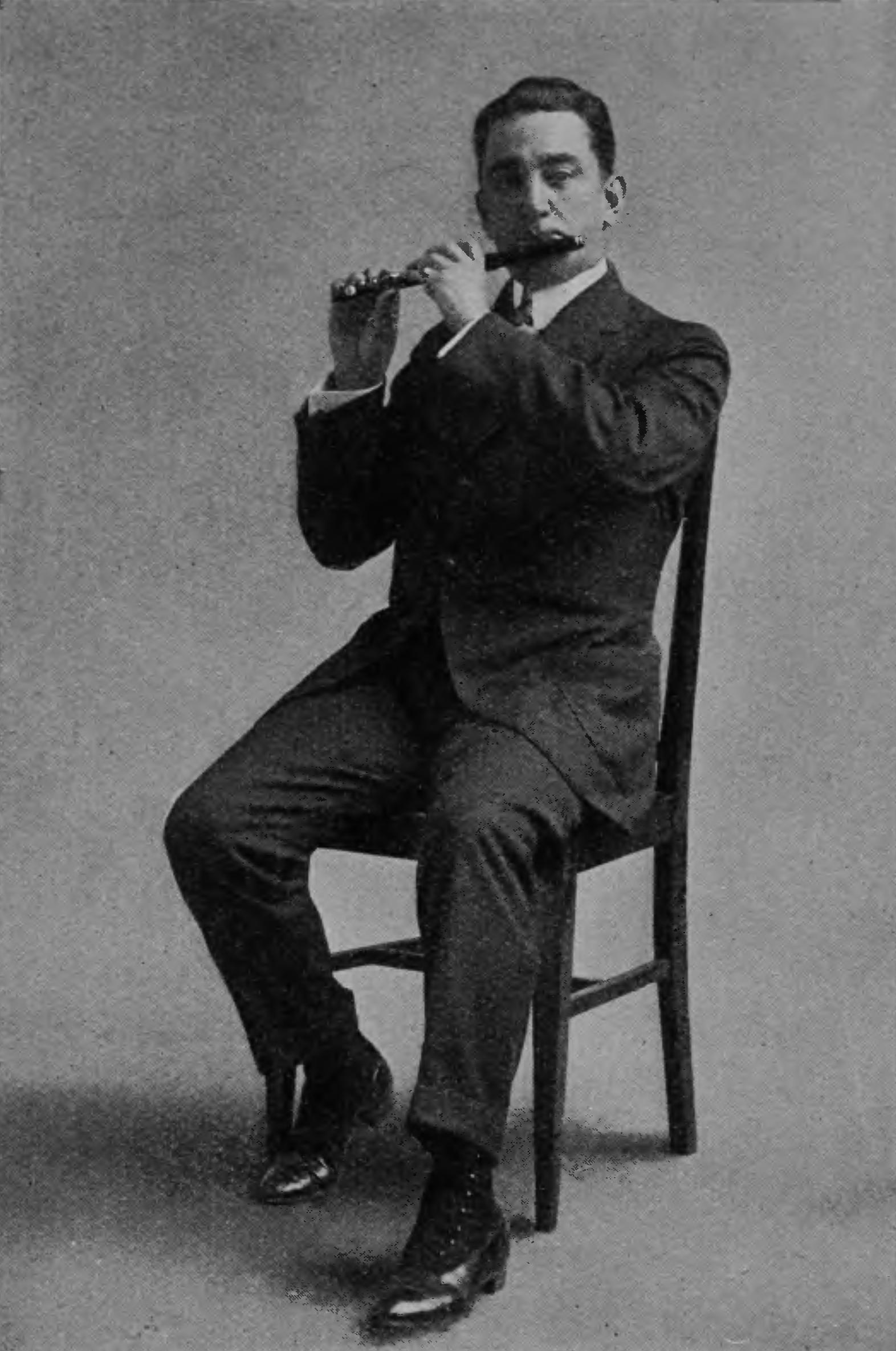 Ernest F. WagnerN. Y. Philharmonic Orchestra